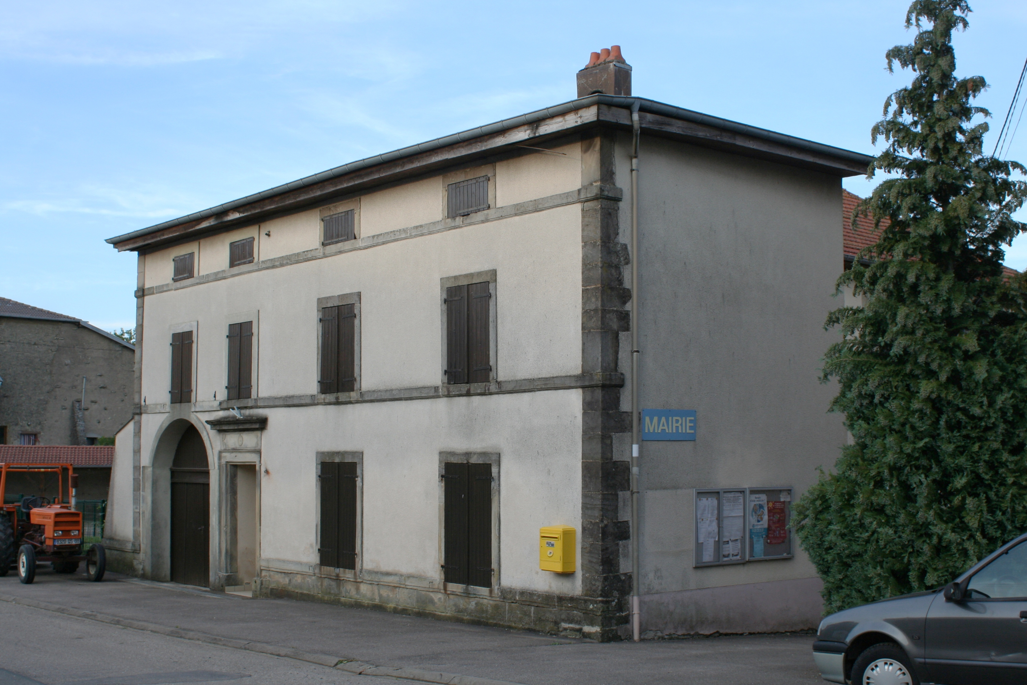 Mairie d'Ortoncourt (Vosges)